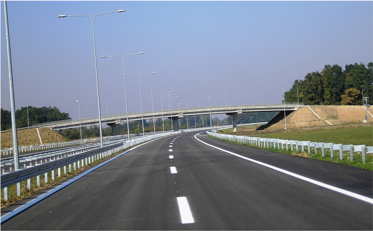 Autoput u okolici Gradiške, BiH